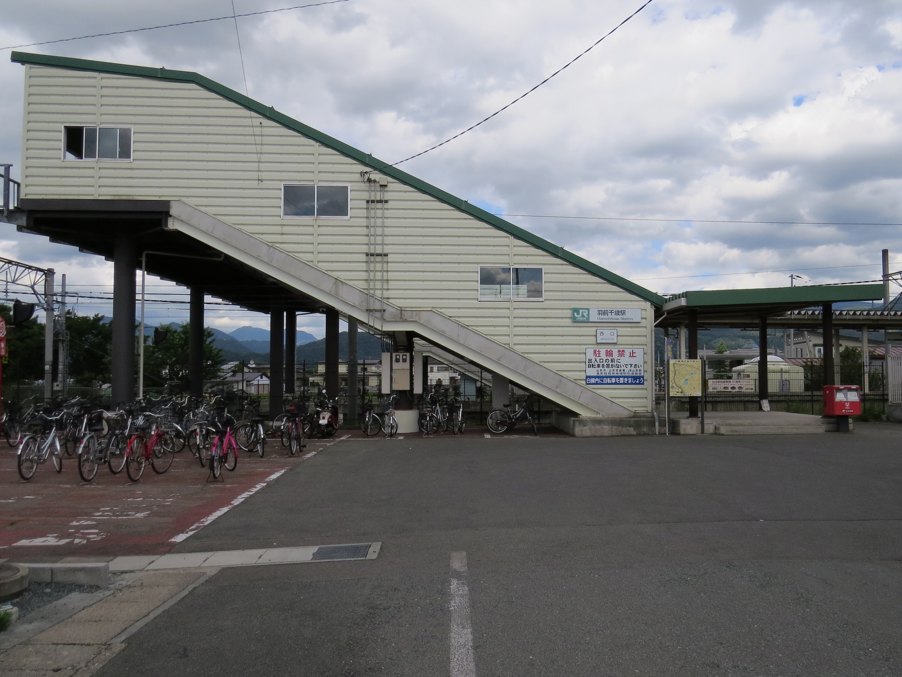 JR東日本 羽前千歳駅 西口